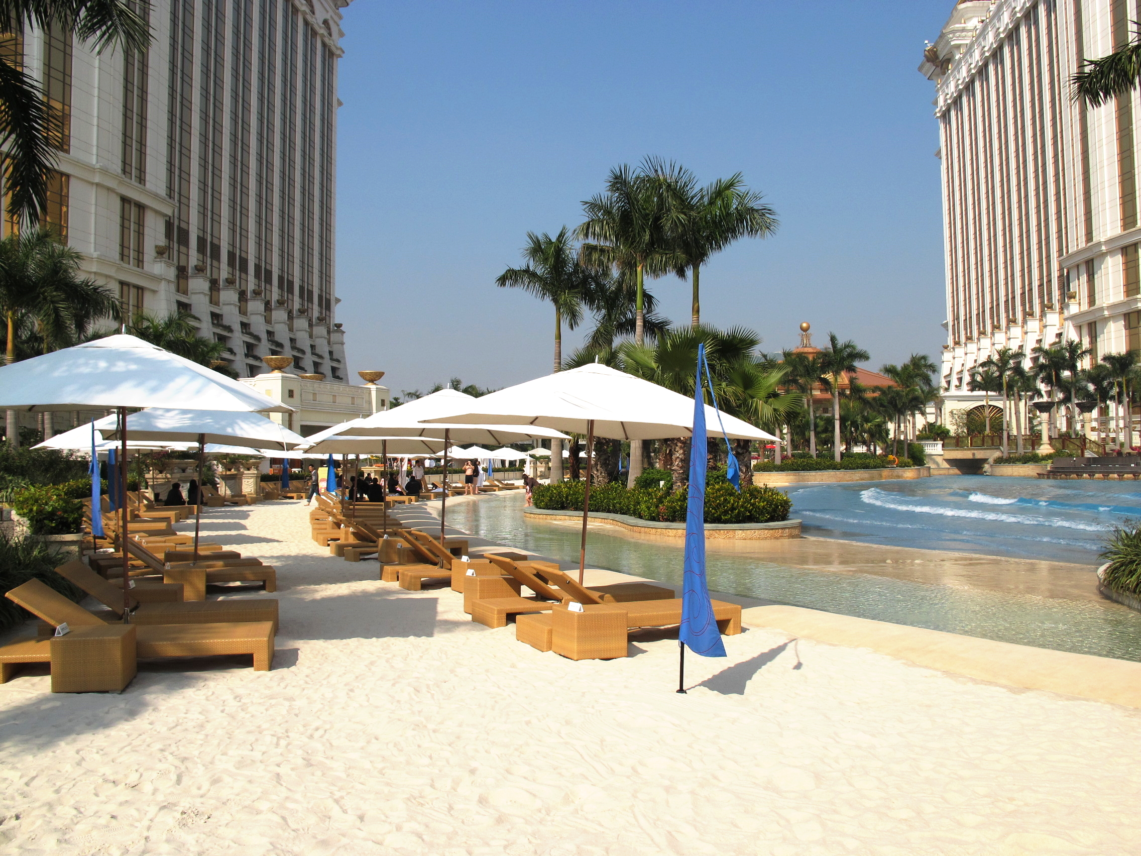 Galaxy Macau Grand Resort Deck